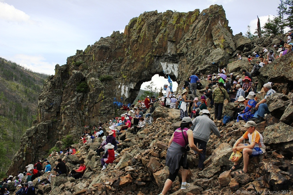 Национальный парк «Алханай». This image is related to the protected area of Russia number 7500031